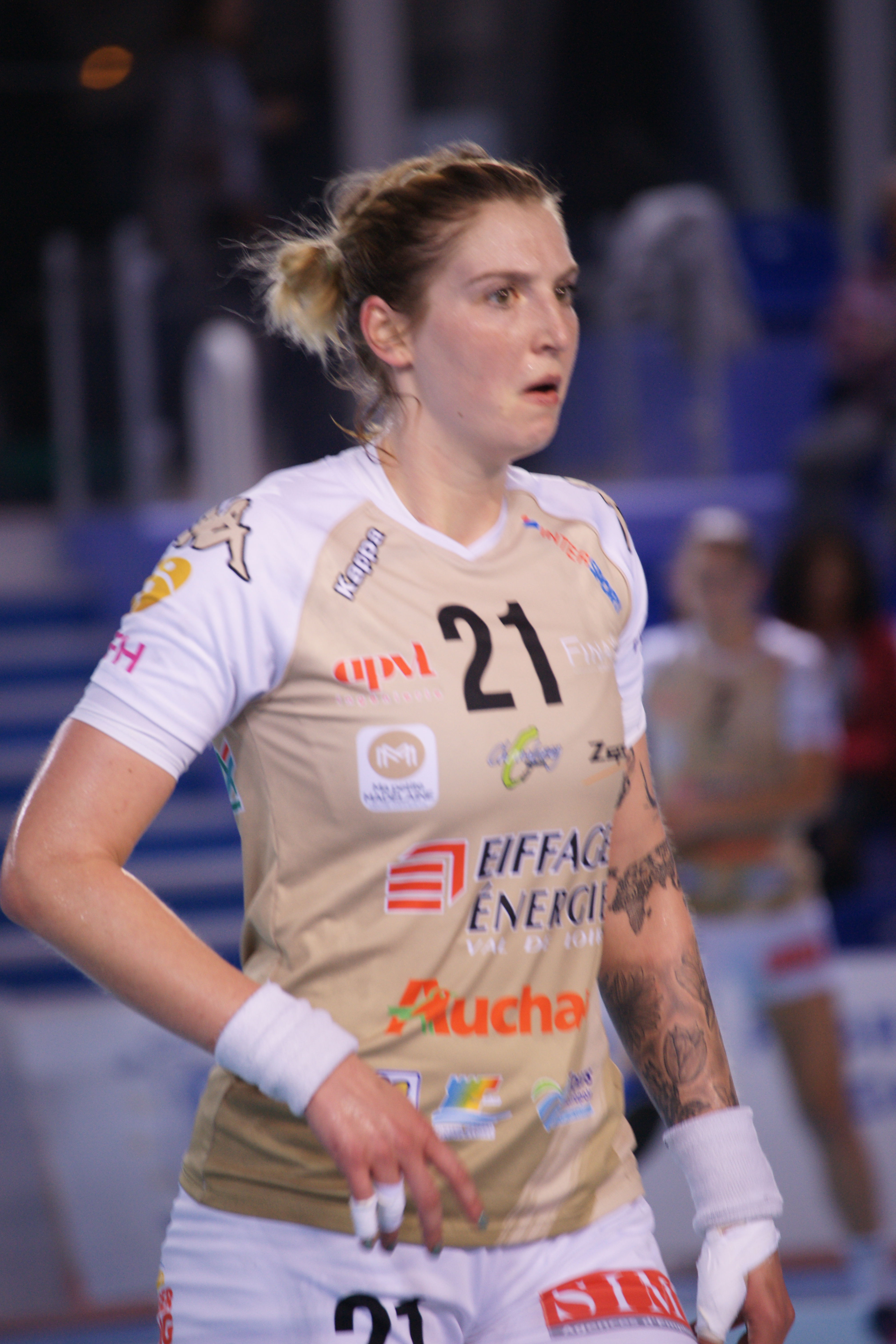 Simonetta Planeta, OGC Nice-Chambray 2017